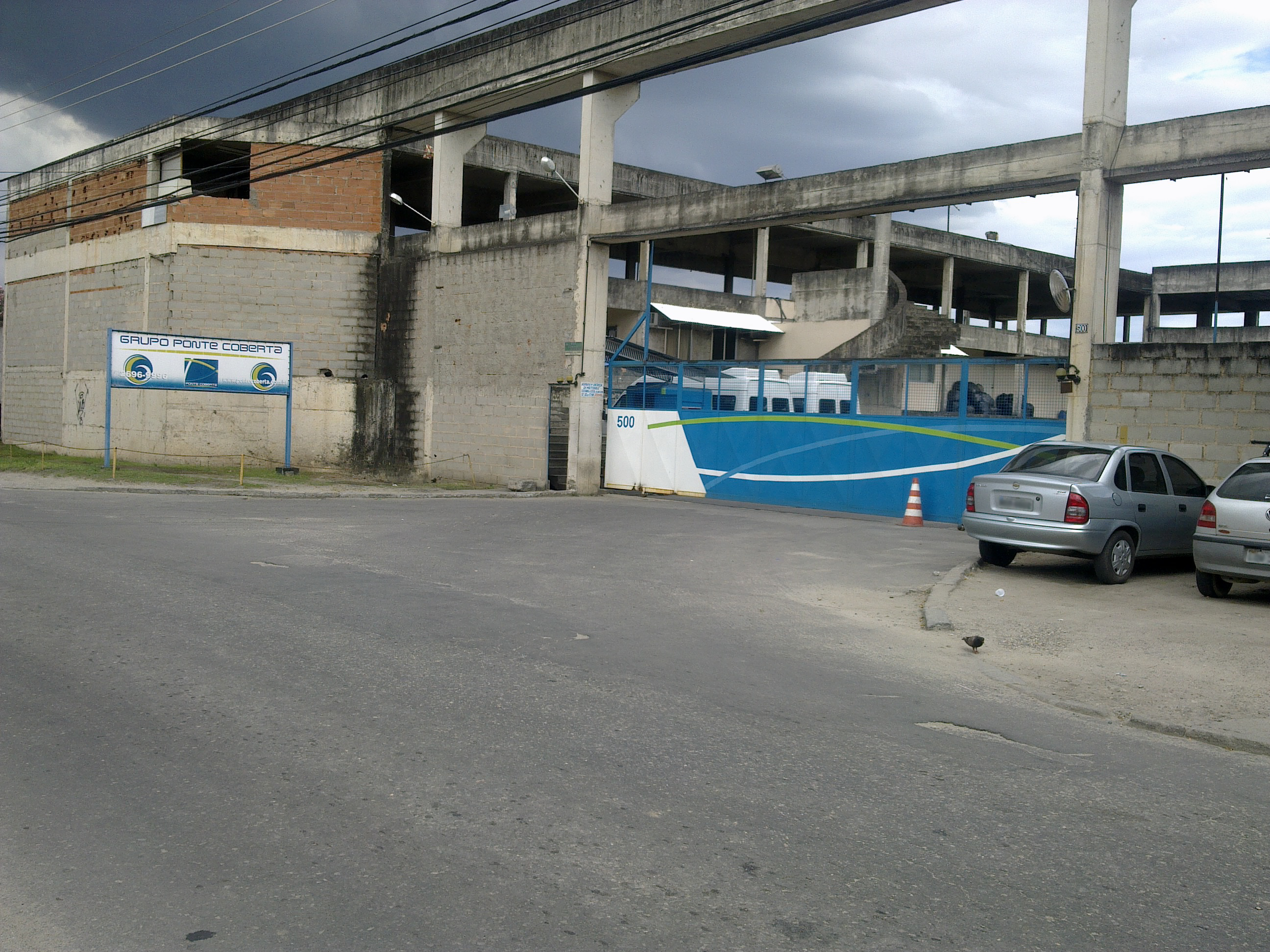 Garagem do Grupo Ponte Coberta no Cosmorama no Município de Mesquita-RJ